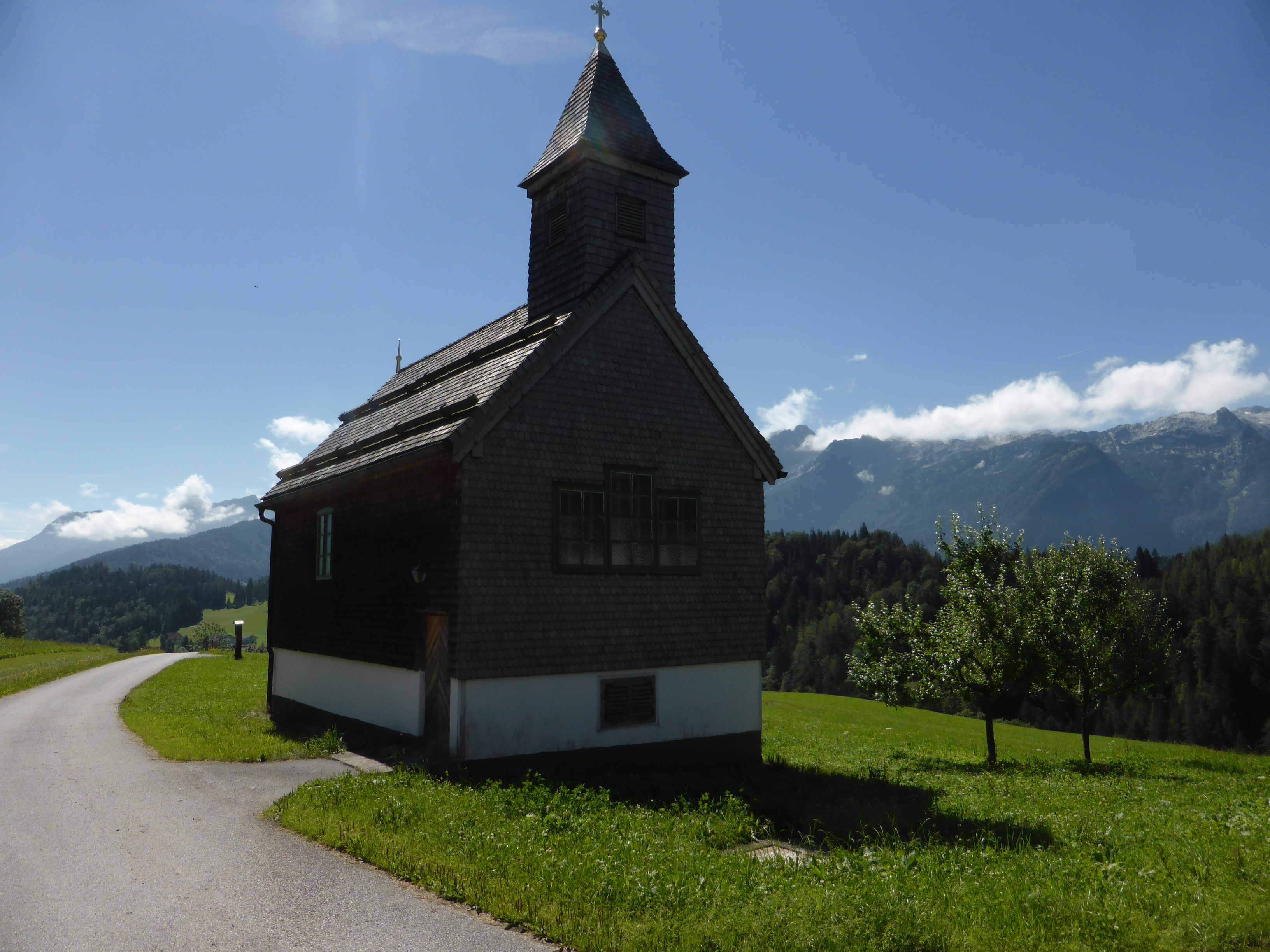 Greinwaldkirchlein (hll. Wilhelm und Leonhard)